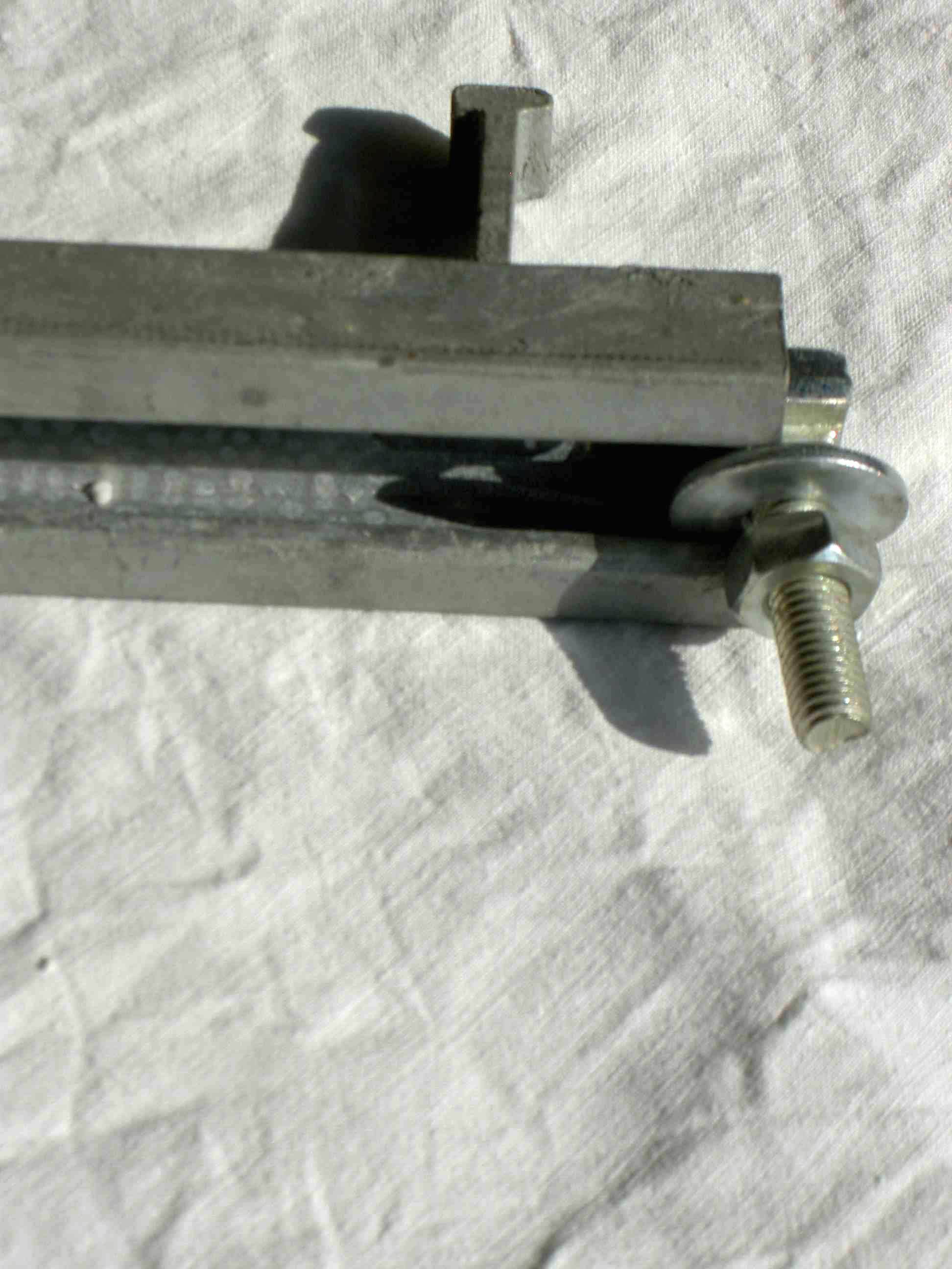 Ankerschiene für Stahlbetonbau